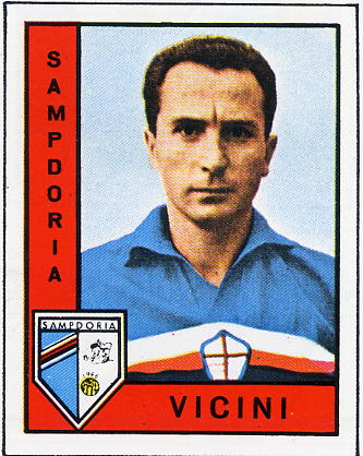 Azeglio Vicini che indossa la maglia del Sampdoria